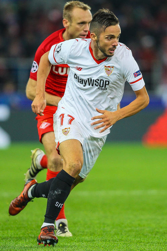 «Спартак» - «Севилья»